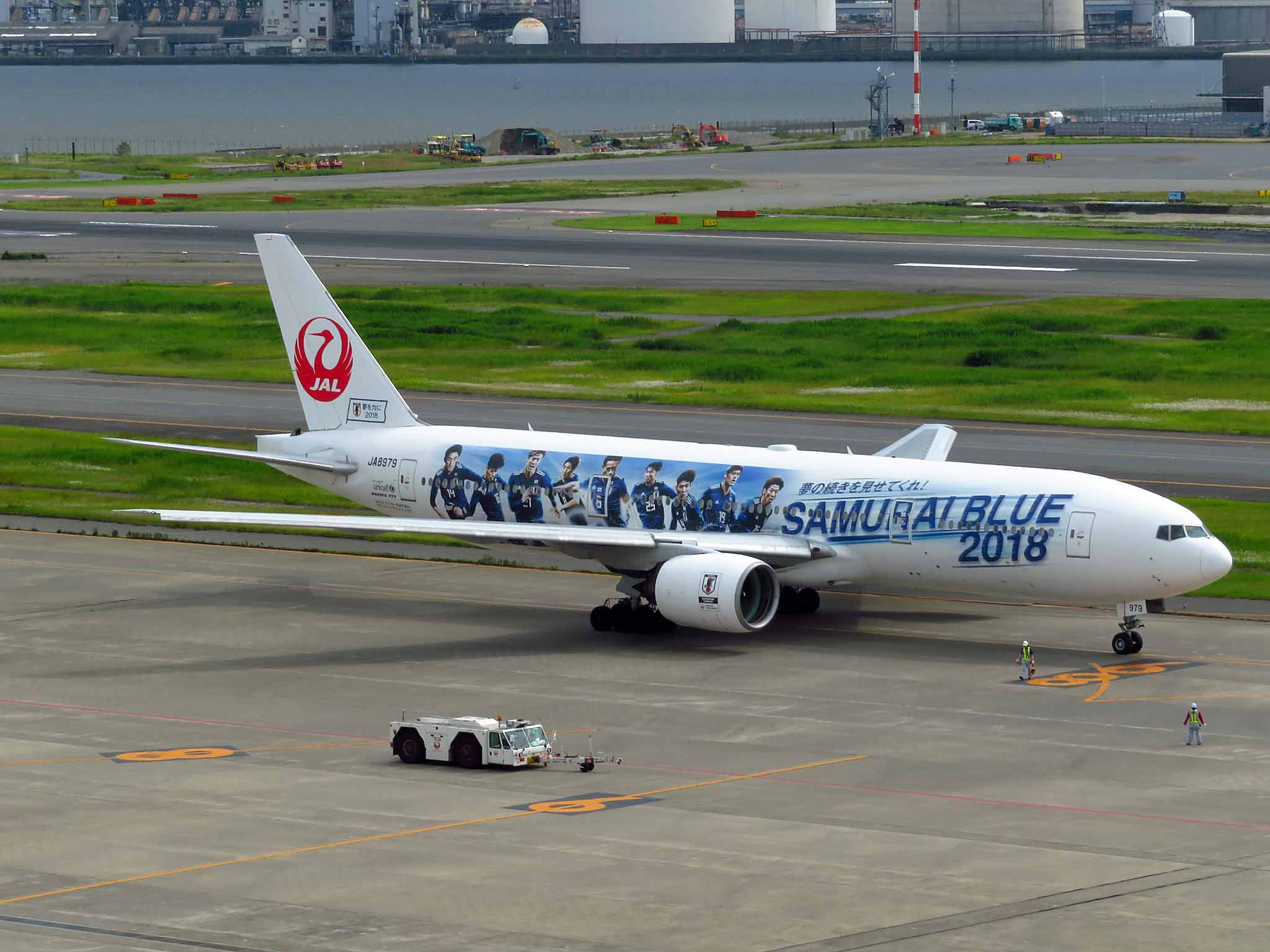 日本航空のFIFAワールドカップサッカー2018年日本代表応援特別塗装機「SAMURAI BLUE応援ジェット」。2018年バージョンは2機が選定され、国内線向けのボーイング777：JA8979は1号機を務める。2号機は国際線向けのボーイング787：JA841Jが起用された。 Canon PowerShot SX720 HS